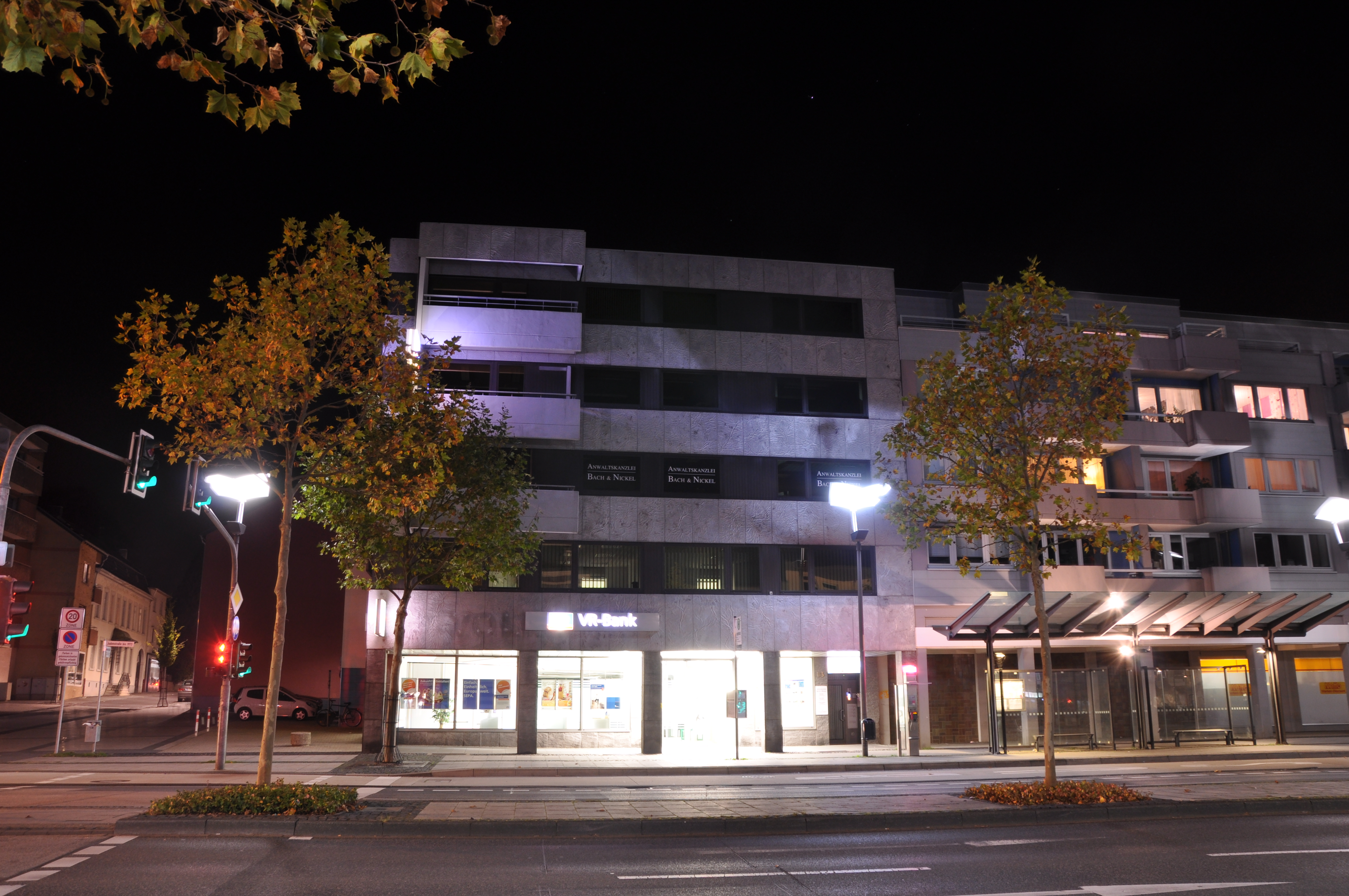 Die Innenstadt von Eschweiler an einem späten Sonntagabend im Oktober 2014. Das Bild wurde mit Stativ und langer Belichtungszeit aufgenommen.